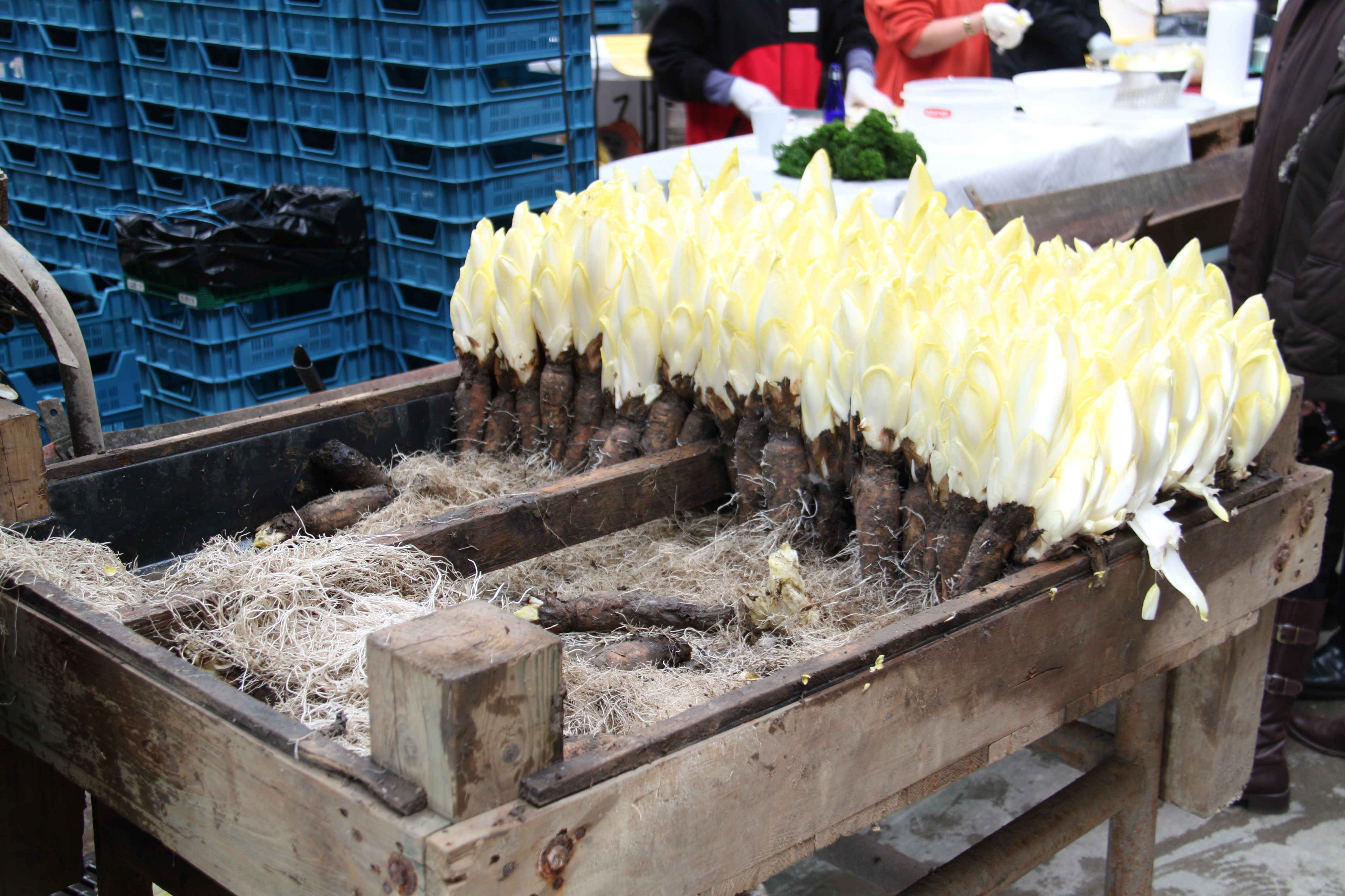 Chicorée Fabrik in Gelsdorf (am Tag der offenen Höfe) - Kiste mit erntefertigen Wurzeln kurz vor der maschinelle Trennung von Knospe und Wurzel